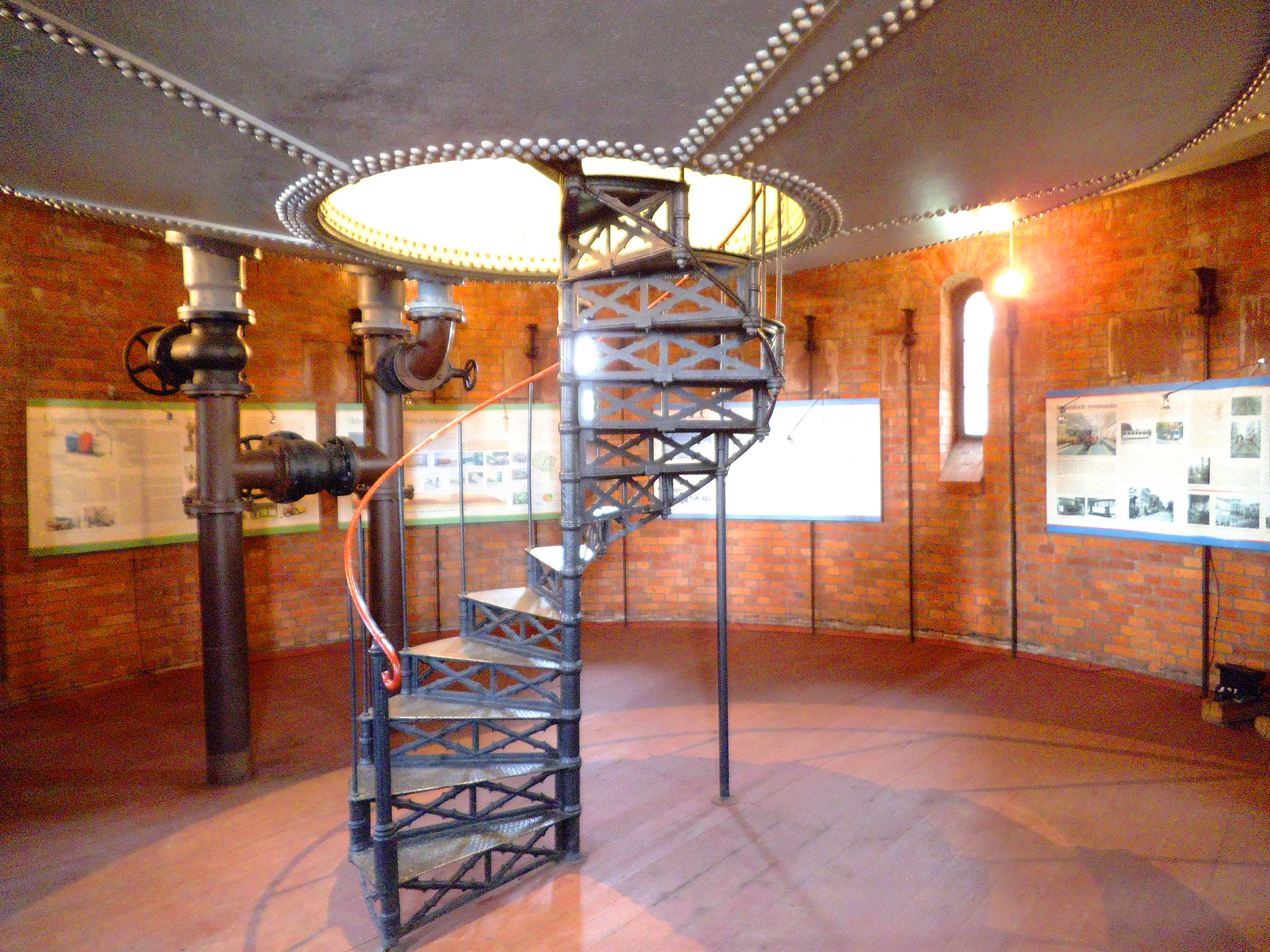 Muzeum Techniki i Inżynierii Komunalnej Torunia